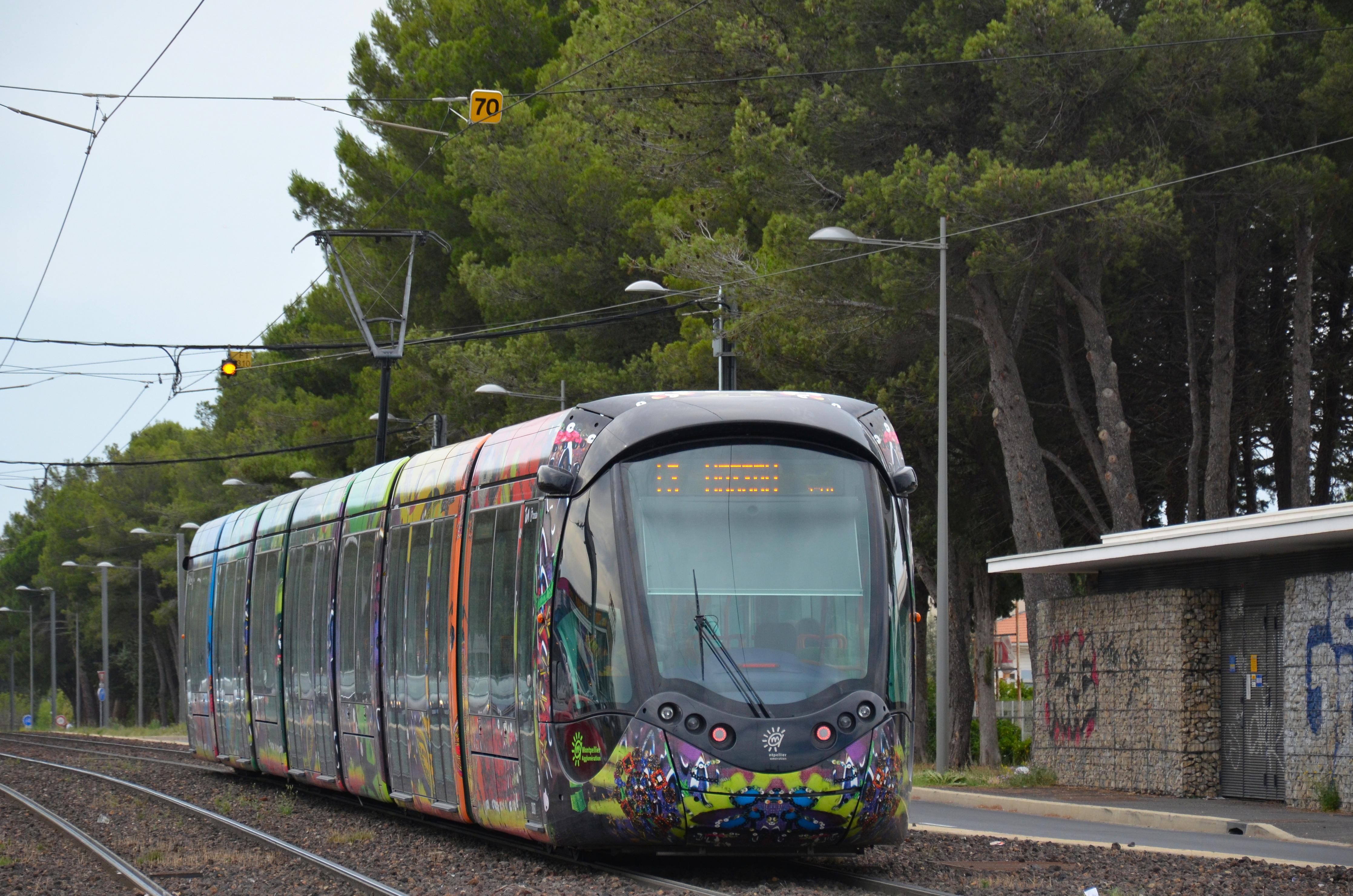 Alstom Citadis 402 n°2087 sur la ligne T3 du réseau TAM de Montpellier, près de la station Boirargues.